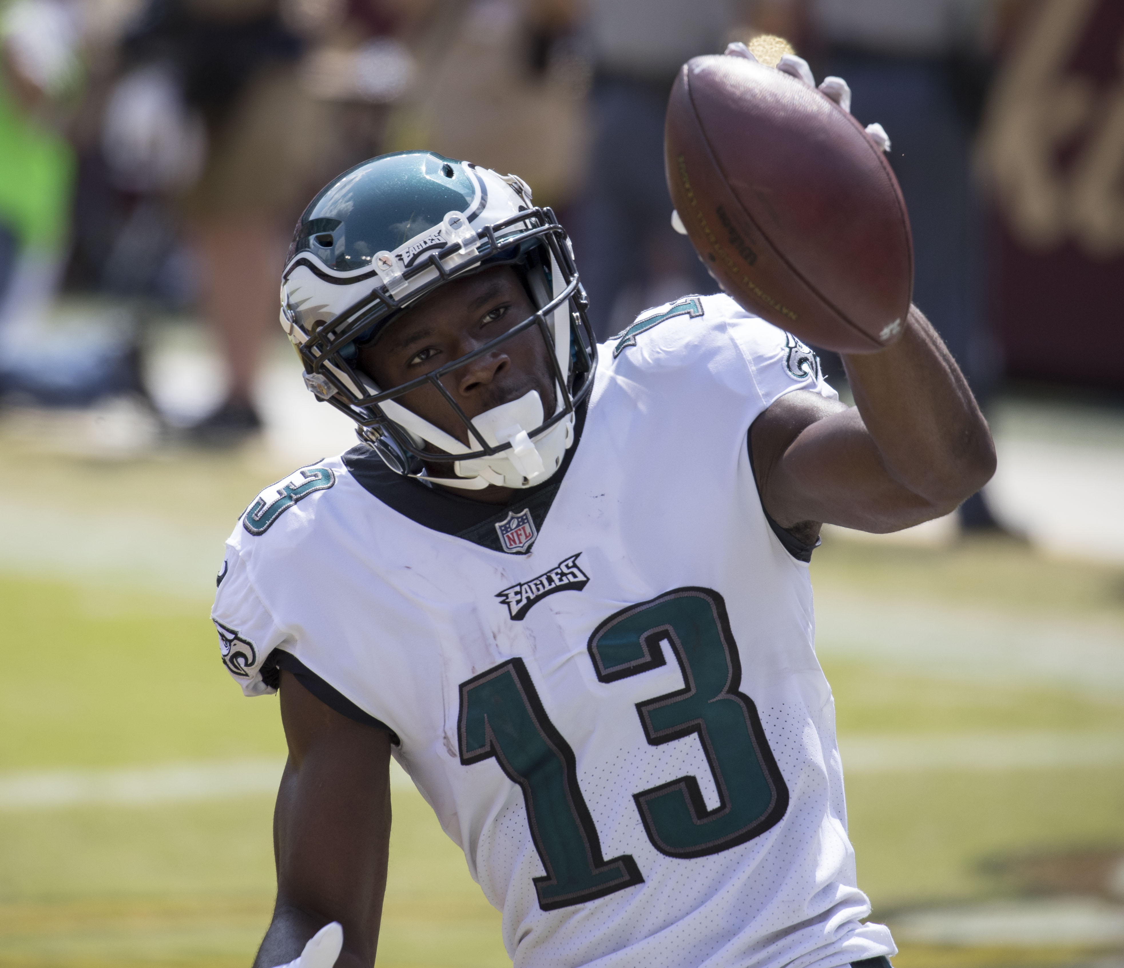 Eagles at Redskins 9/10/17